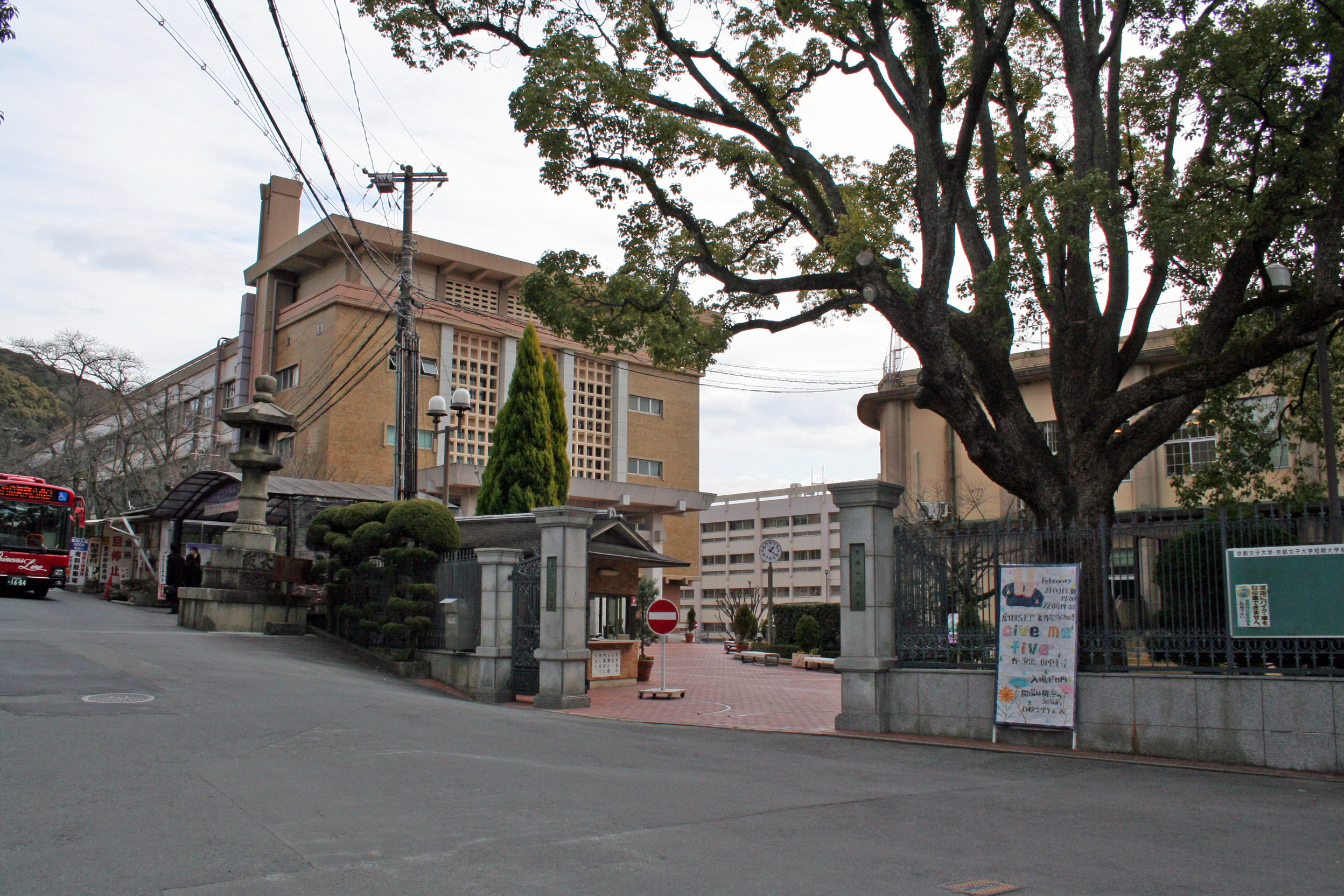 京都府京都市にある大学。「京都女子大学」